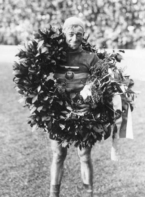 Erik Bohlin